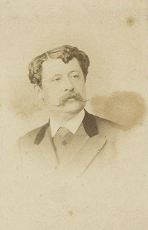 Henri-Joseph Dugué de La Fauconnerie (1835-1913)